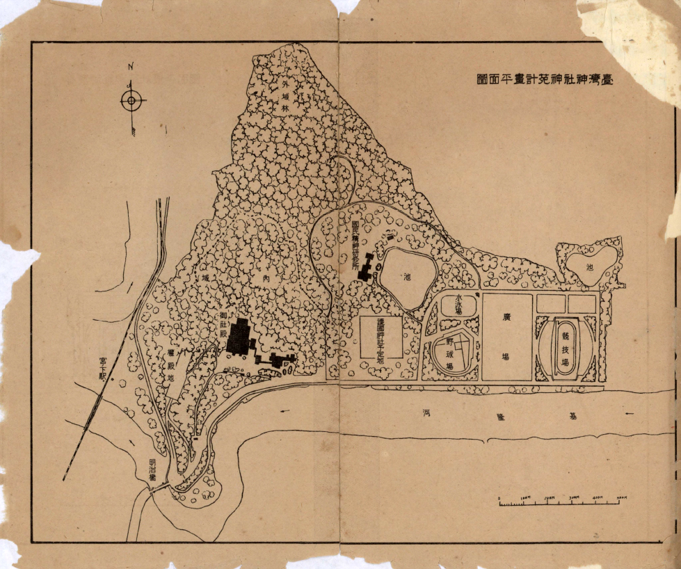 中文（台灣）: 臺灣神社神苑包含內苑、外苑，及位於外苑的護國神社和國民精神研修所